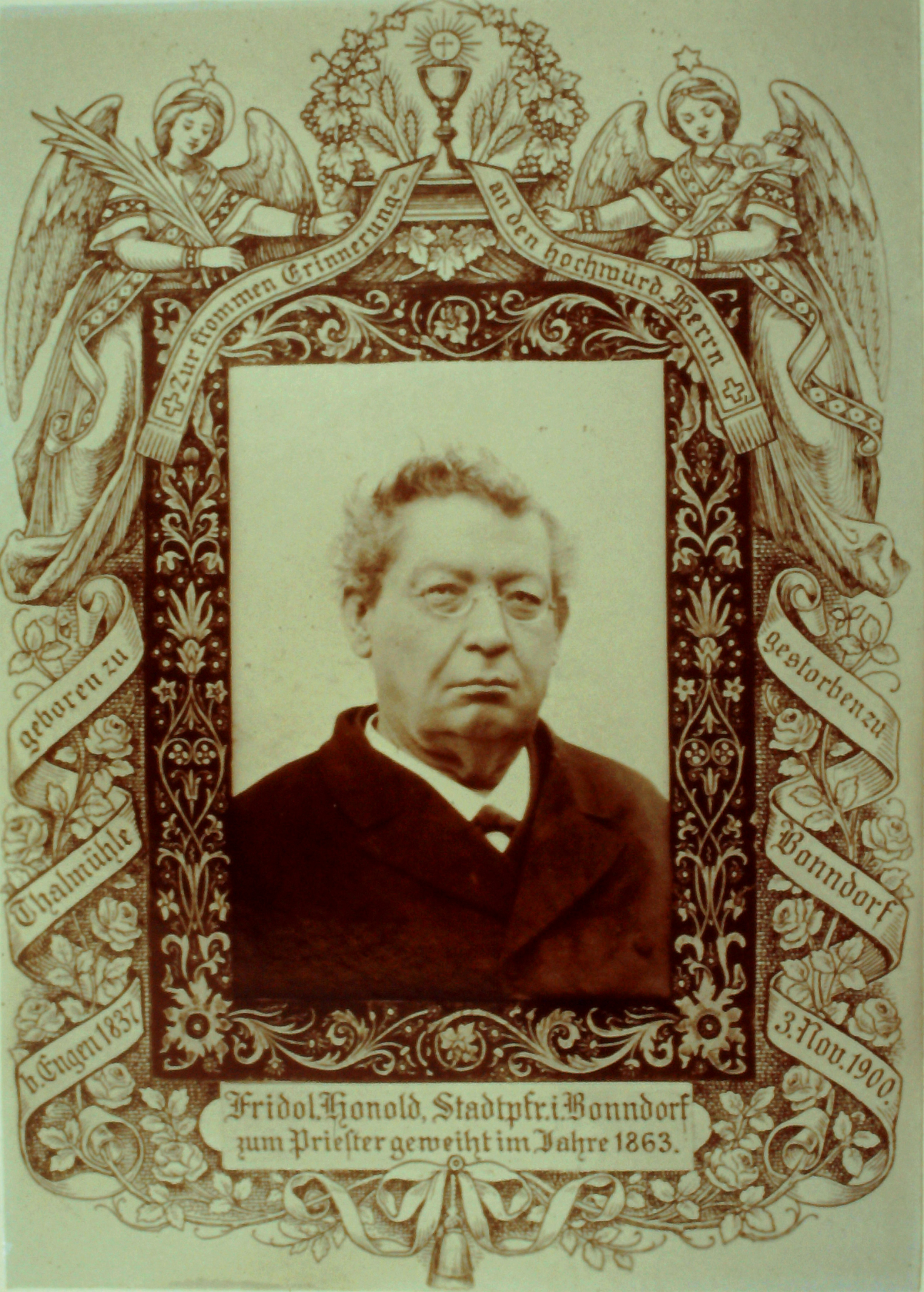 Erinnerungsfoto an den Bonndorfer Stadtpfarrer Fridolin Honold (1837-1900)